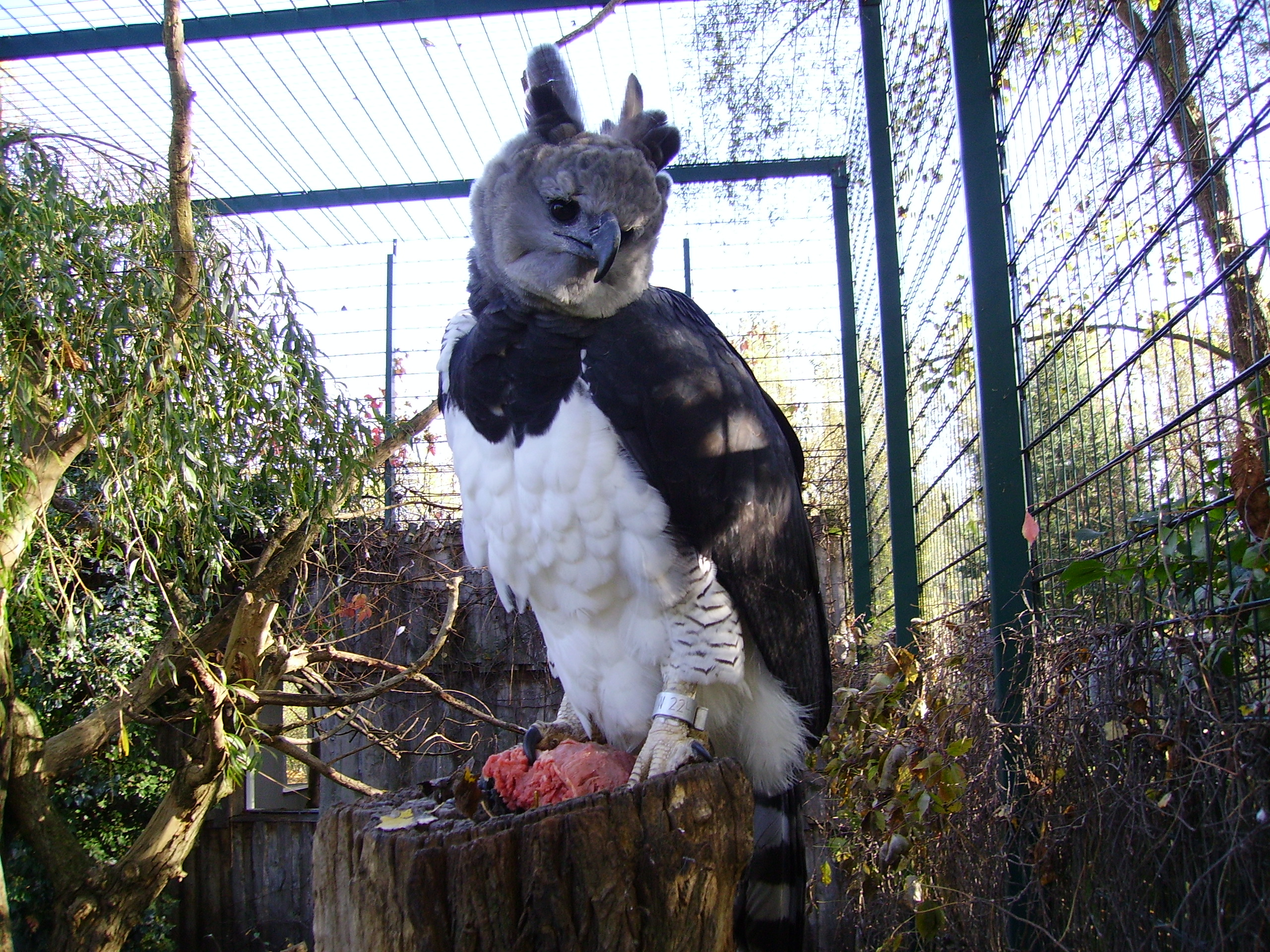 Harpye mit Fleisch in den Fängen